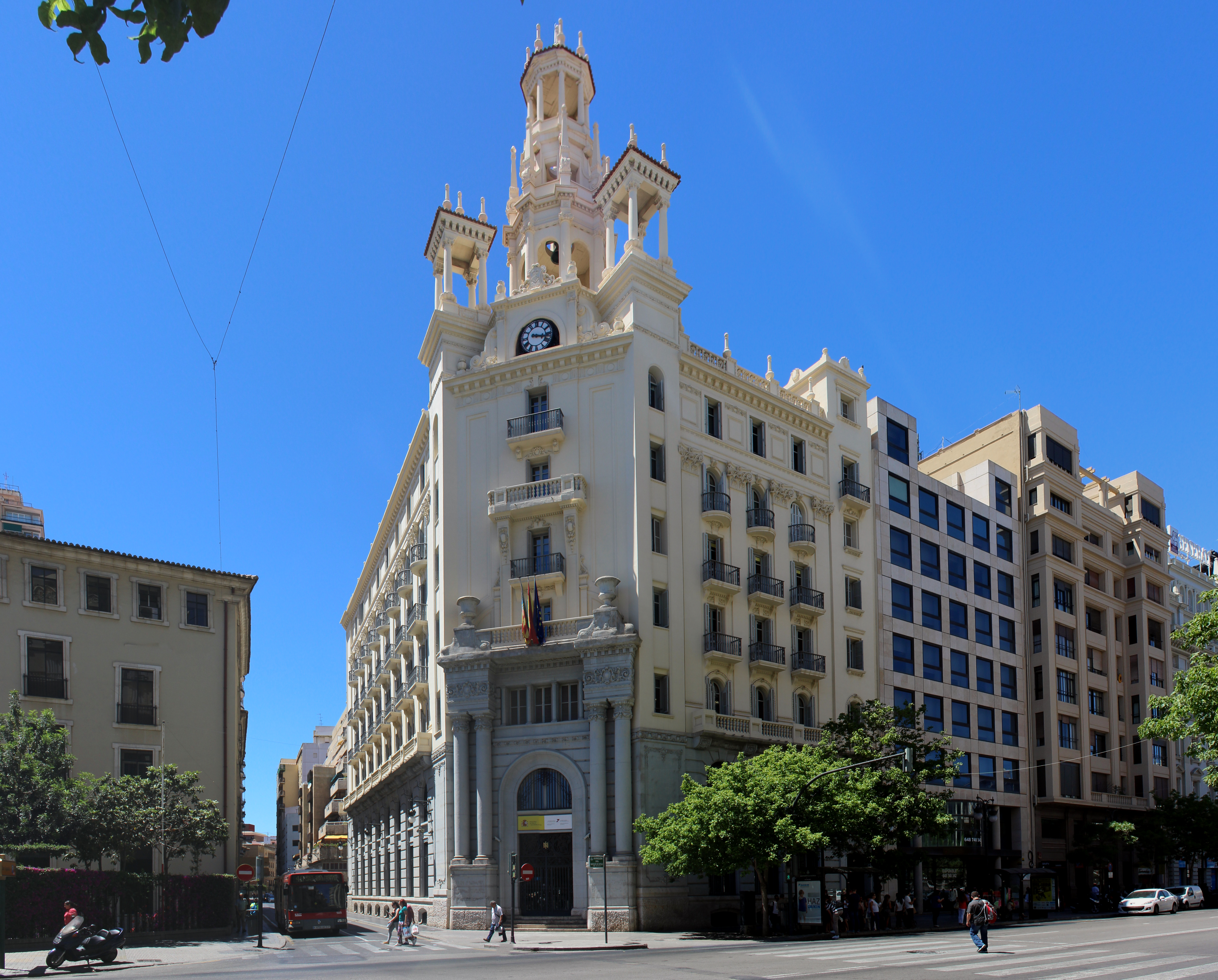 Edificio del Instituto Nacional de Previsión en Valencia, conocido popularmente como la Casa del Xavo